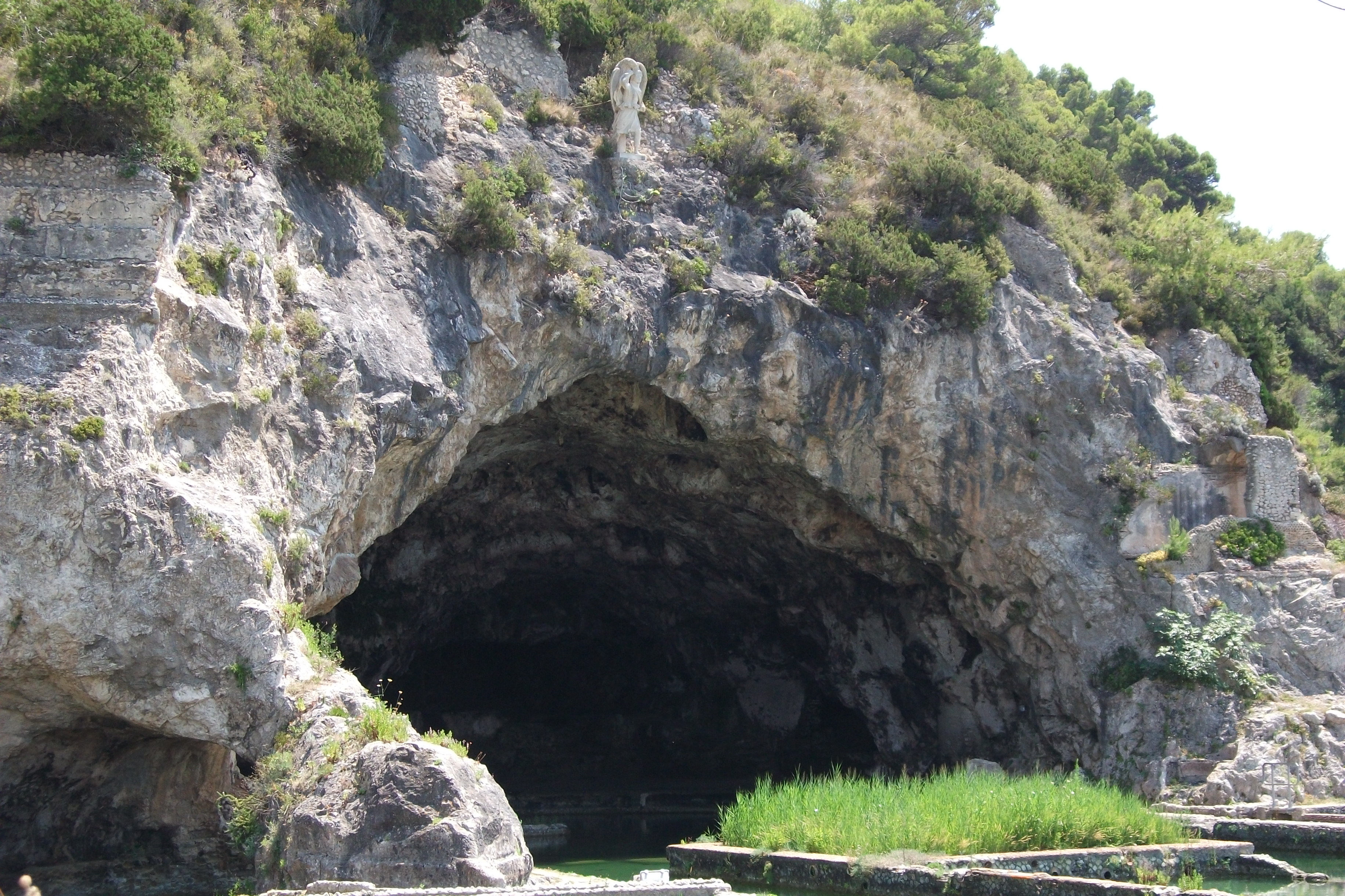 Sperlonga